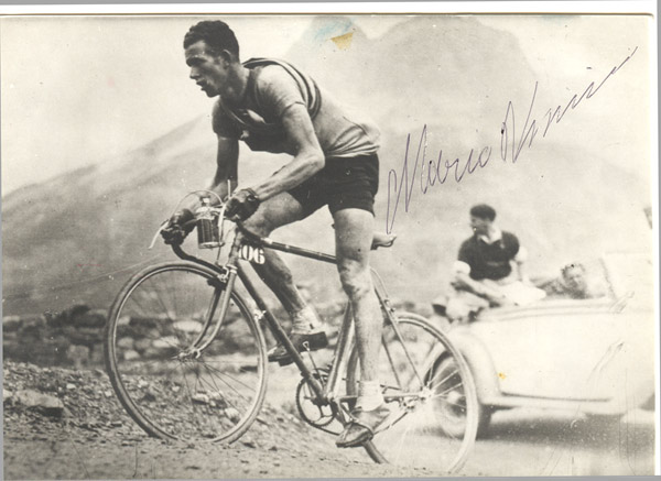 Mario Vicini klimt (1937)